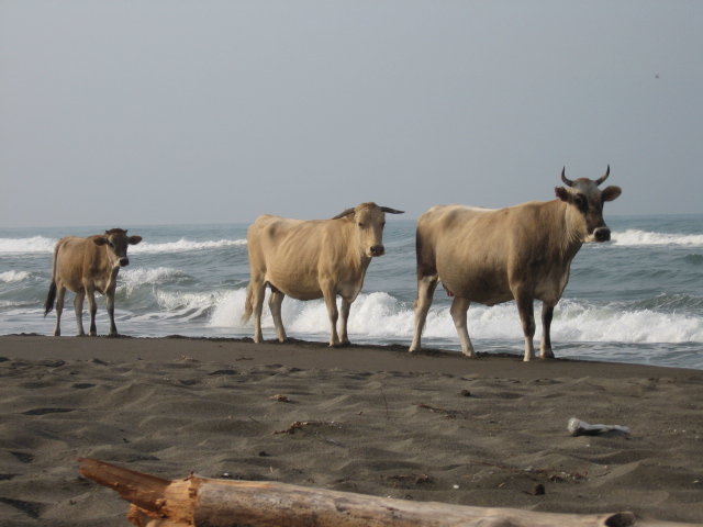 Slobodne krave na Adi Bojani.